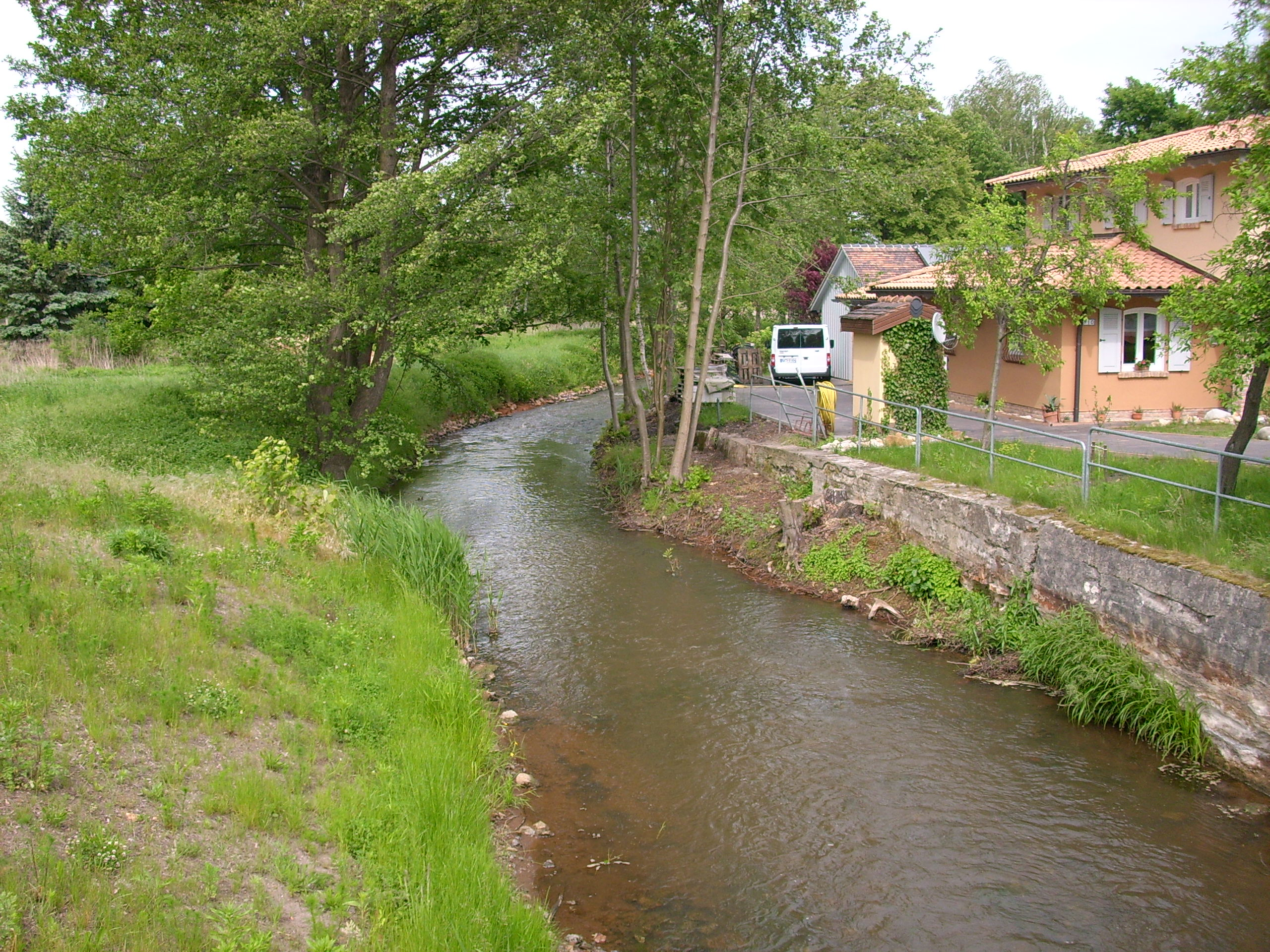 Kleine Spree in Burghammer (Spreetal) Hornjoserbsce: Sprjewica w Bórkhamorju.